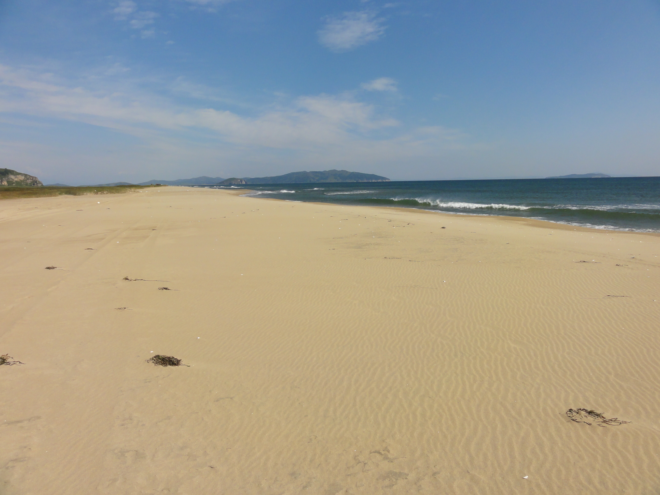 Хасанское взморье - 19-км песчаный пляж у границы с КНДР, самый южный морской пляж России.